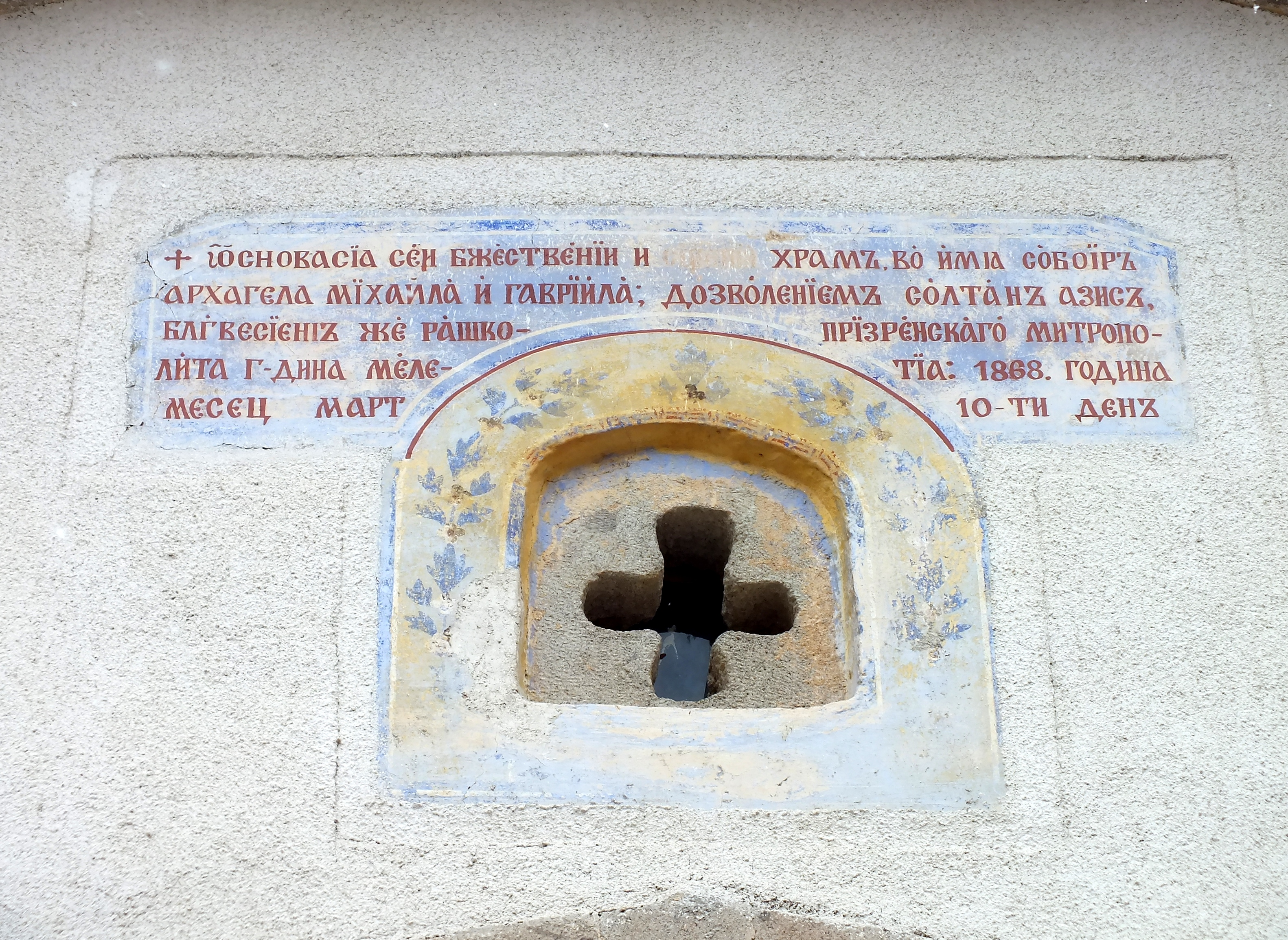 Ulaz u manastir